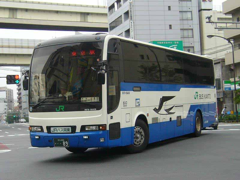 登録番号： 足立200か・・89 ジェイアールバス関東(JR Bus Kanto)東京支店所属 car no.S678-99409 夜行用車両 （各系統で共通運用） 日産ディーゼル・スペースウィング ADG-RA273RBN改